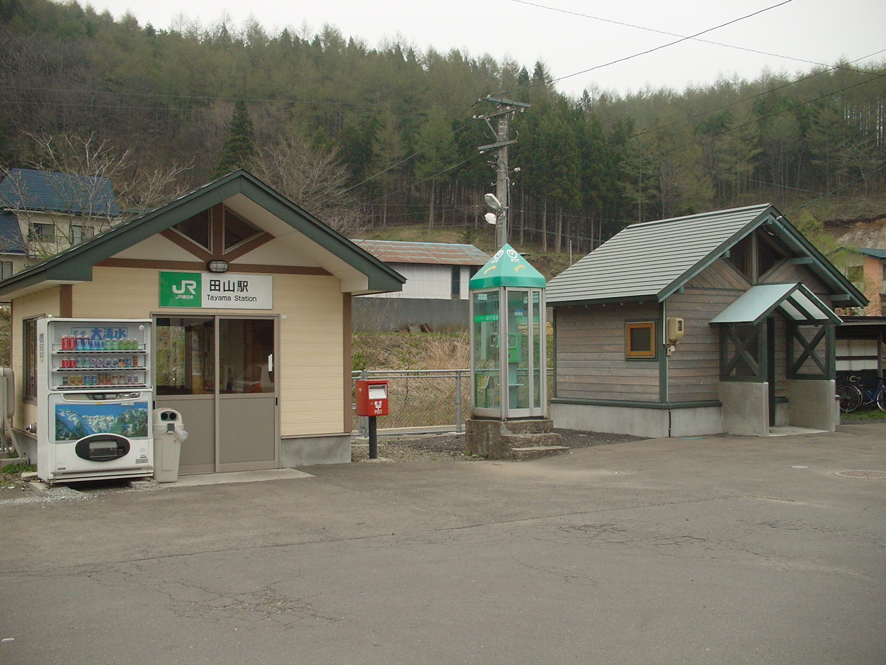 （田山駅）